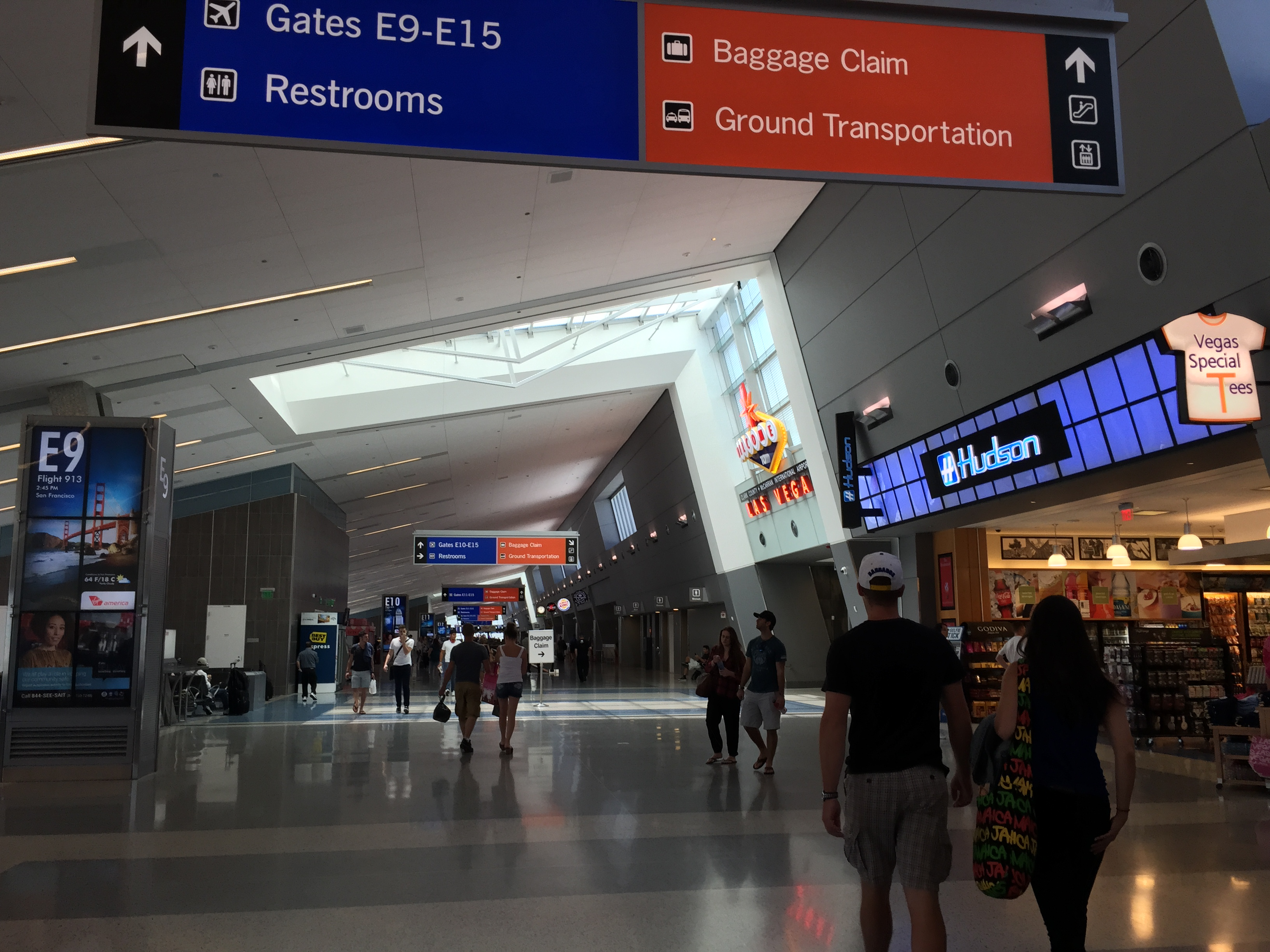 Pasillo de salidas de la Terminal 3 del Aeropuerto Internacional de Las Vegas.